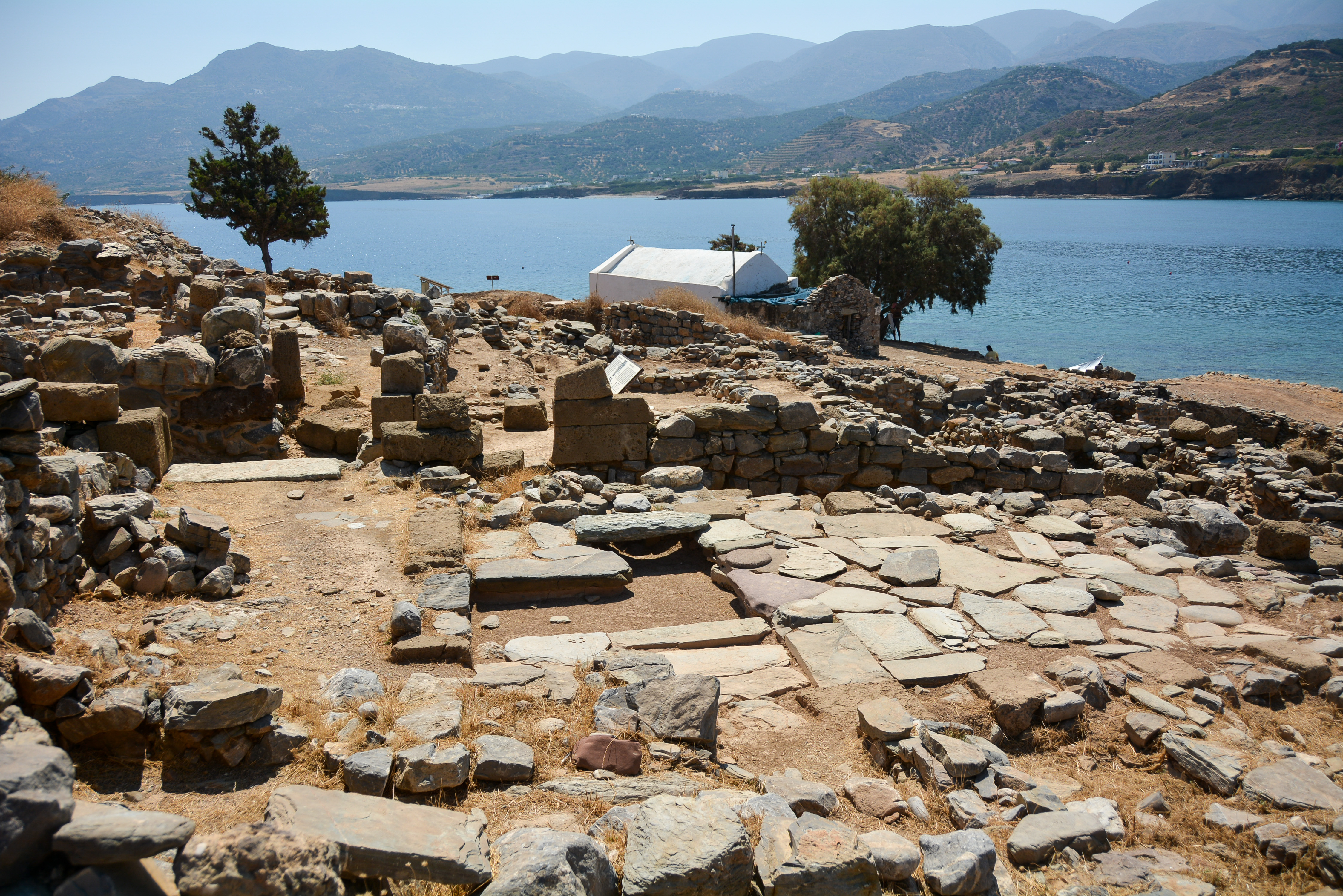 Μόχλος«Μόχλος»